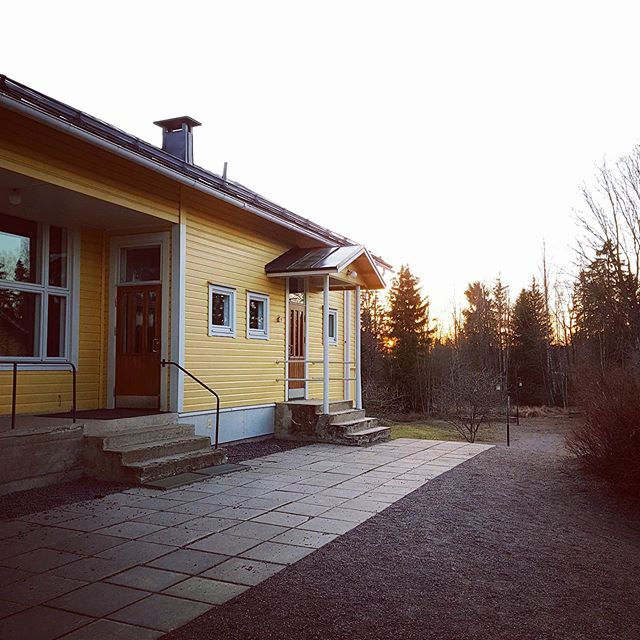 Ohkolan vuonna 1983 rakennettu yläkoulurakennus.